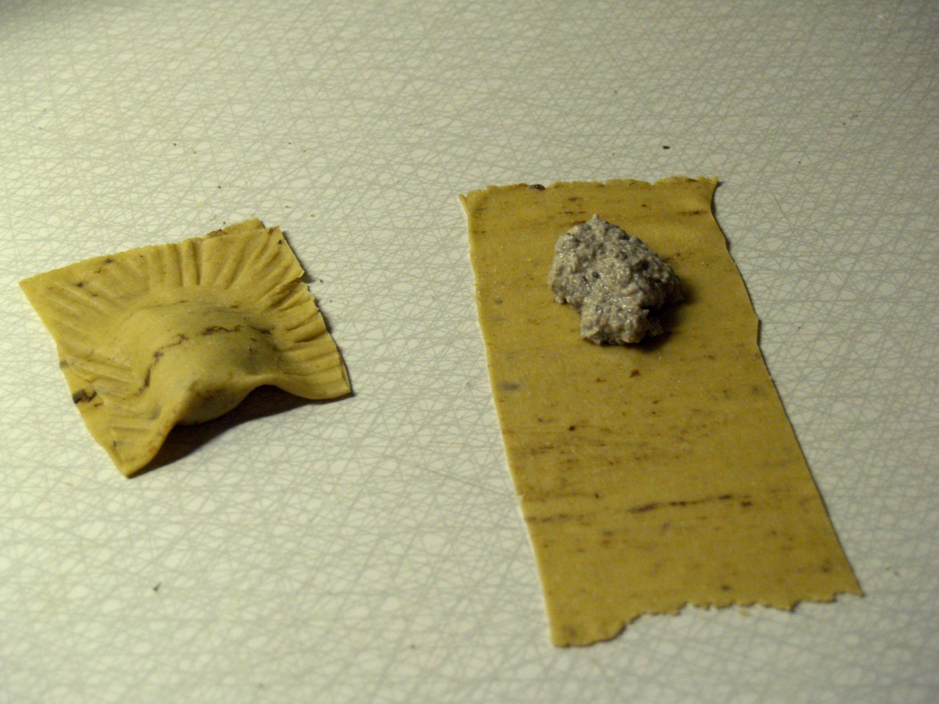 Ravioli med svampe, mascarpone og trøffelolie